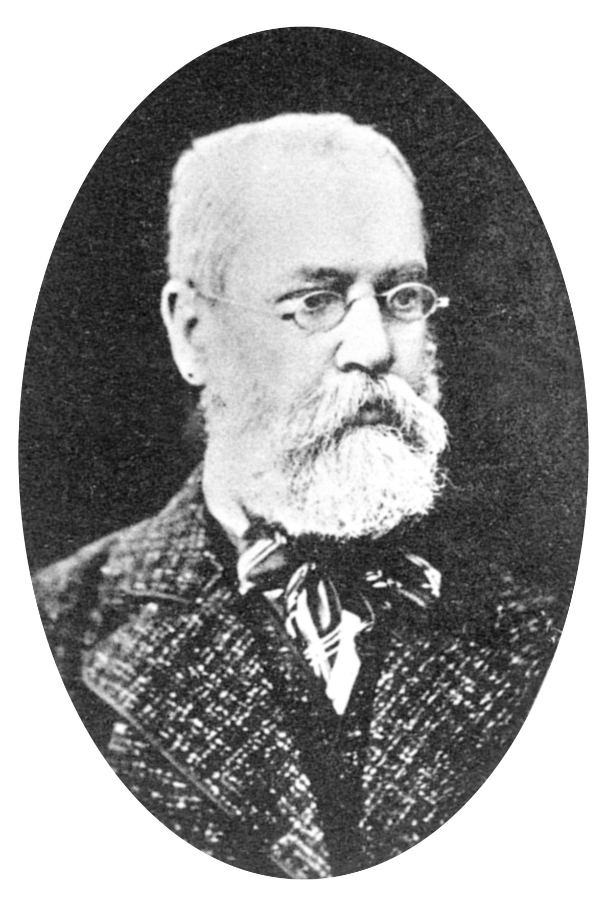 Портрет И. М. Догеля